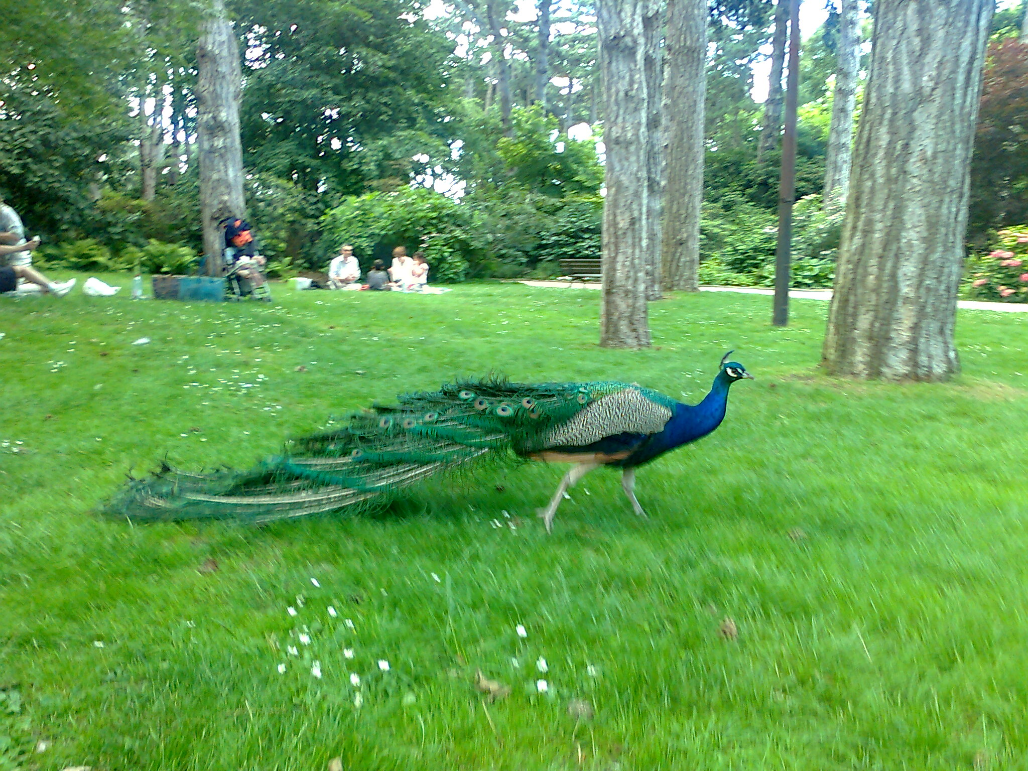 Paon se promenant dans le Parc Floral de Paris (Juillet 2012)